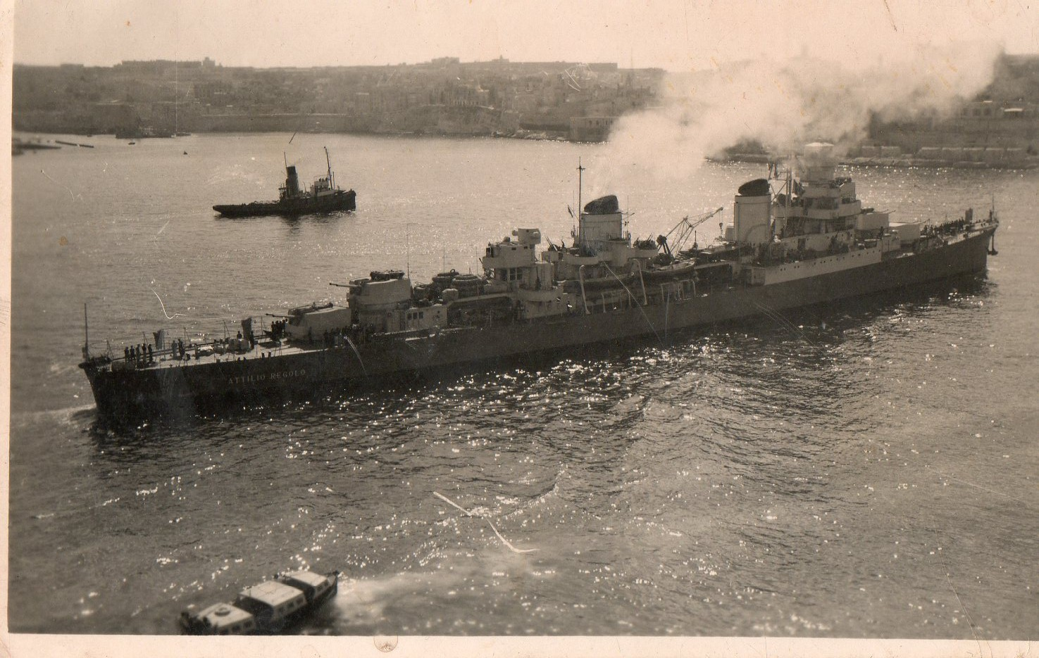 L'Incrociatore Attilio Regolo con la pitturazione della cobelligeranza